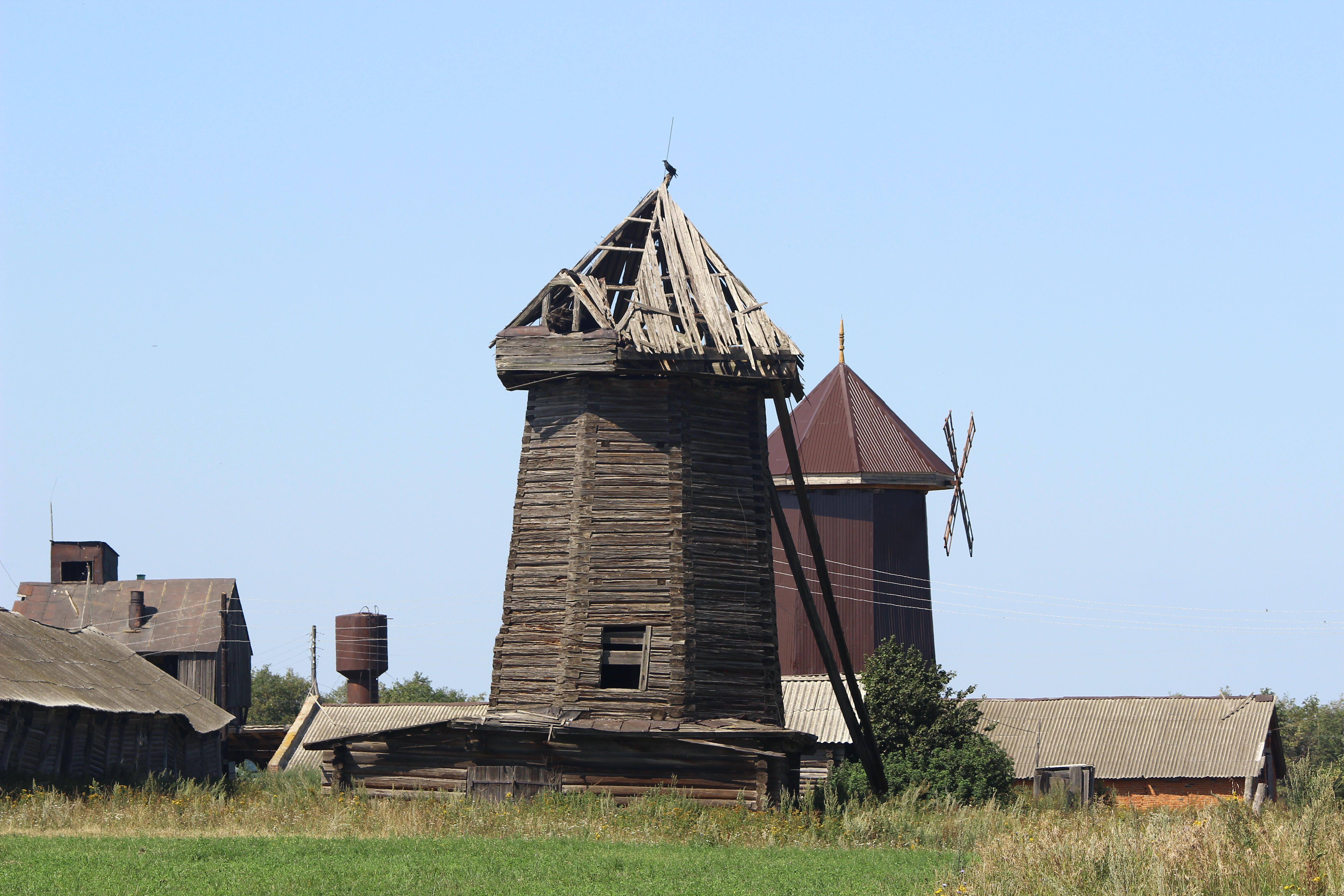 Ветряные мельницы. Не действующие. Одна из мельниц на грани разрушения, вторая частично отреставрирована и защищена от осадков листами металла. Деревня Сятракасы Сарабакасинского сельского поселения Чебоксарского района Чувашской республики. Дата съемки 13.08.2014